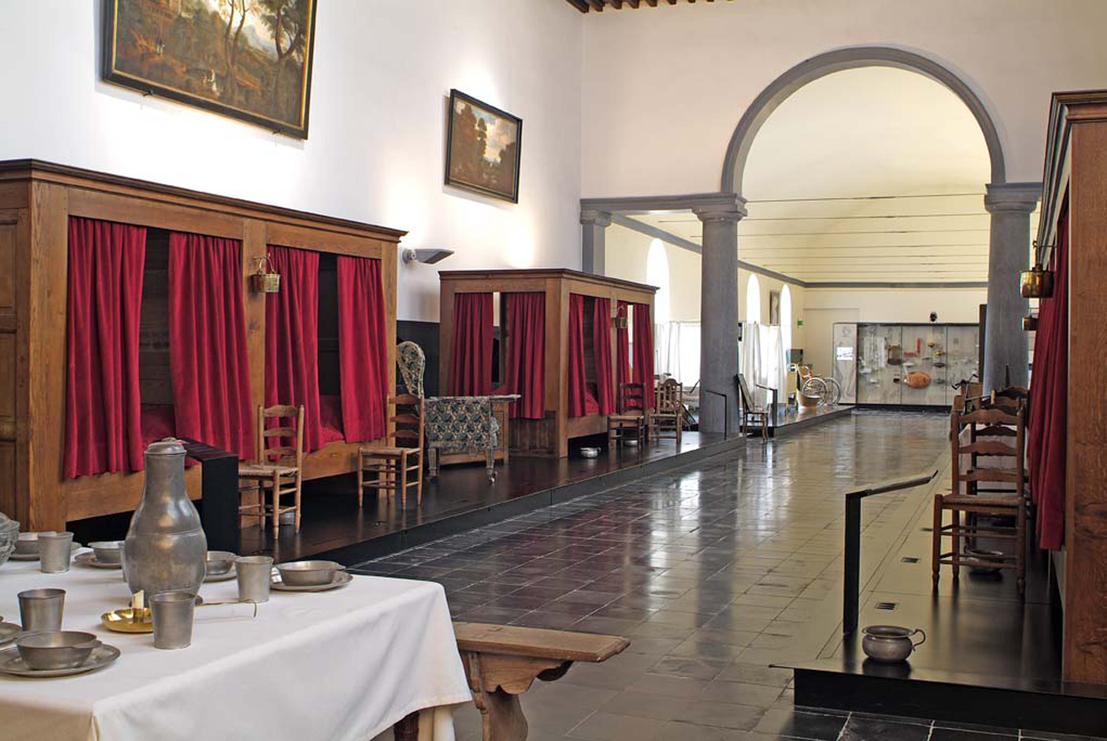 salle des malade 1